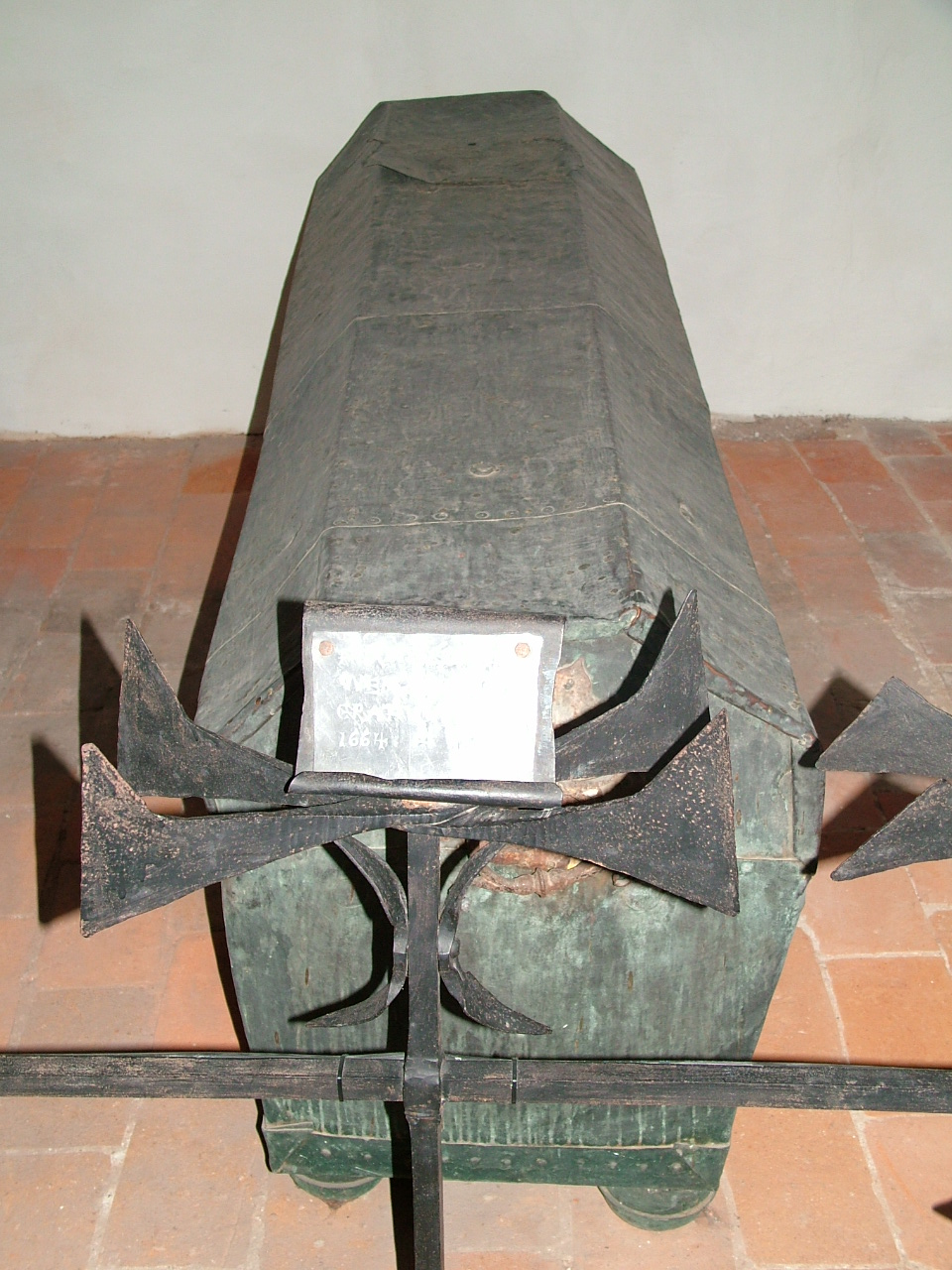 Grab Bischof Wenzeslaus von Thun, Bischofsgruft des Passauer Doms